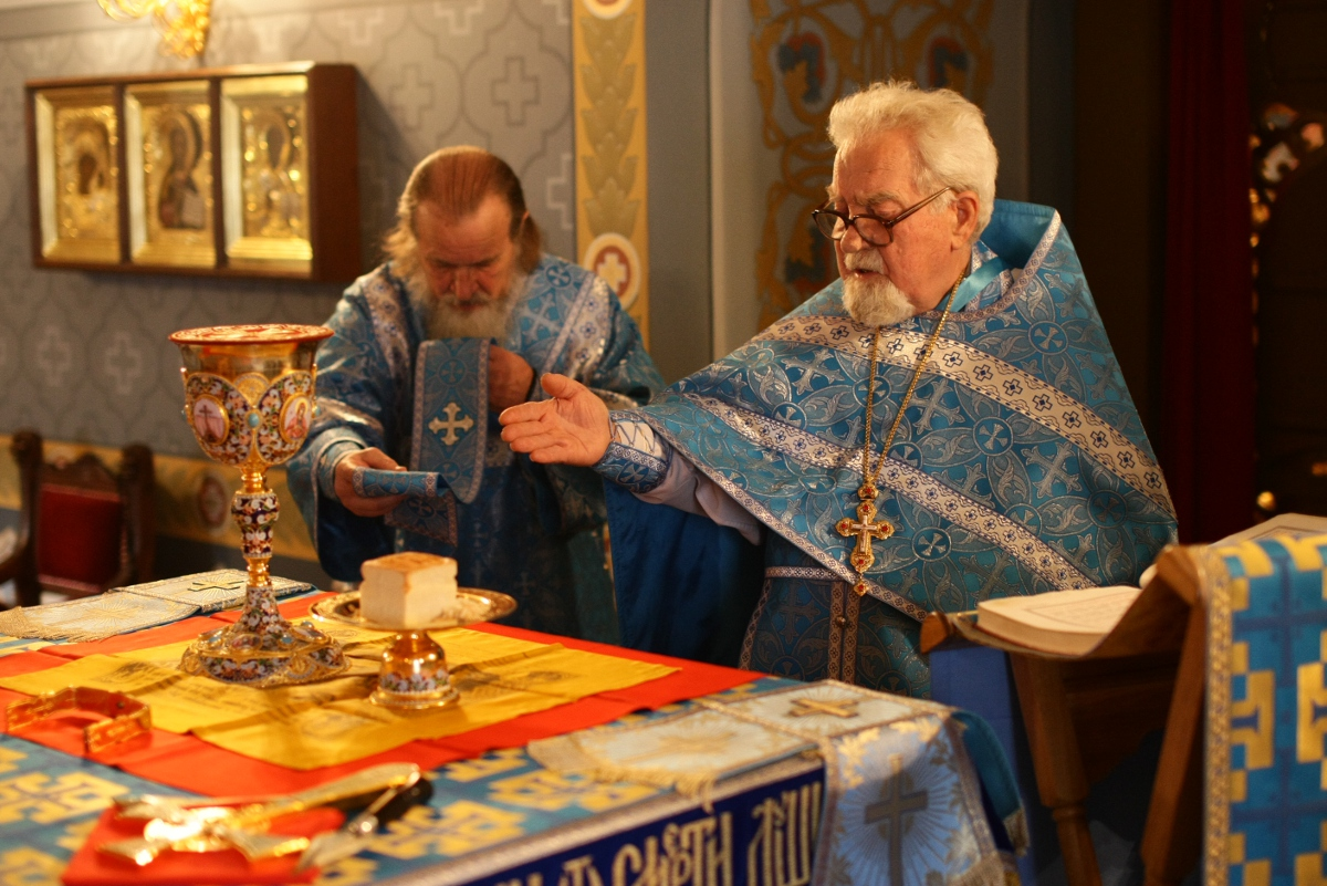 Евхаристический канон. Служба Казанской иконы Богородицы.